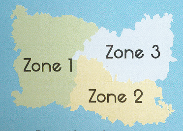 Cartes des zones du département